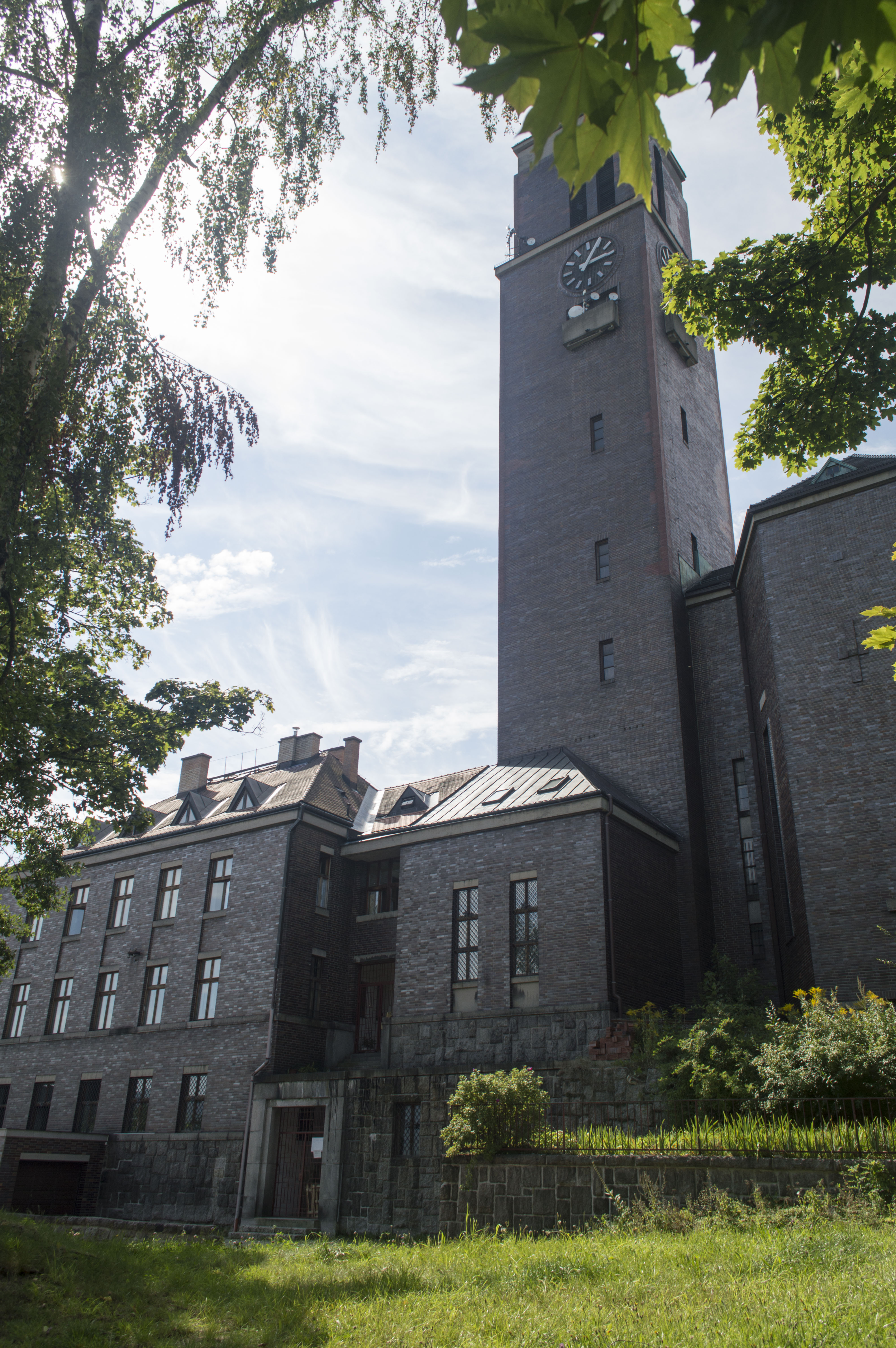 Kostel Nejsvětějšího srdce Páně v Jablonci nad Nisou.